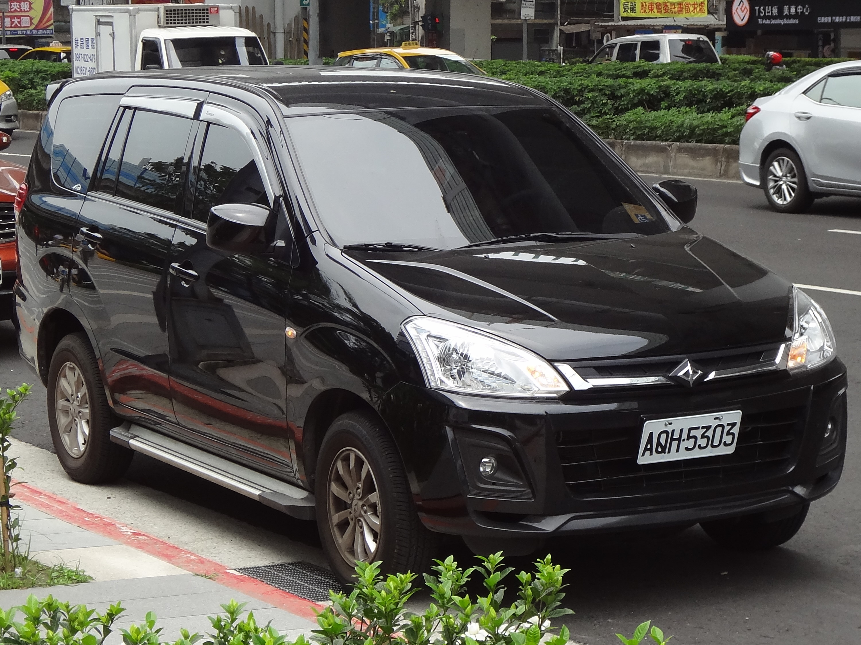 中華雙贏AQH-5303。